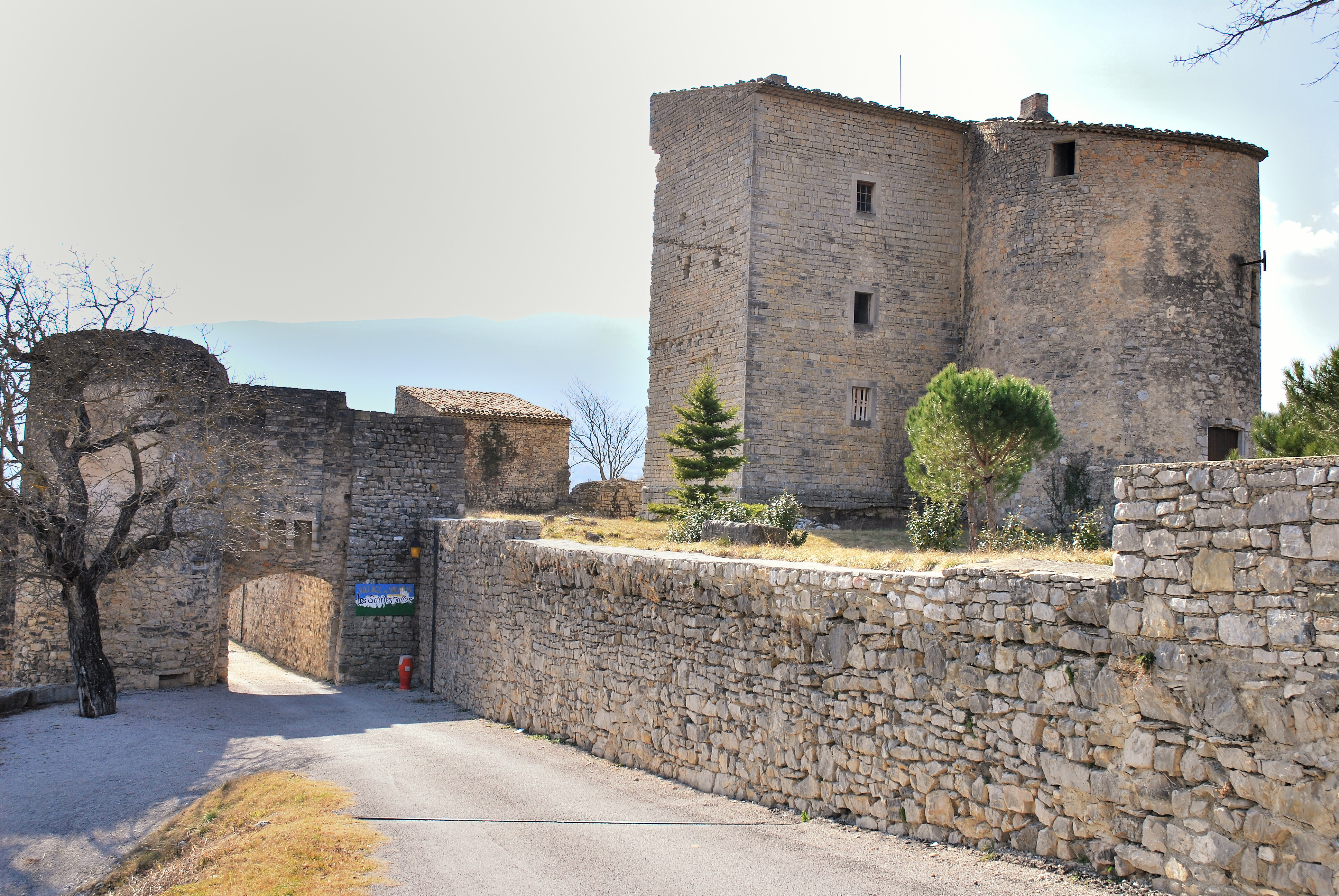 vieille porte d'accés